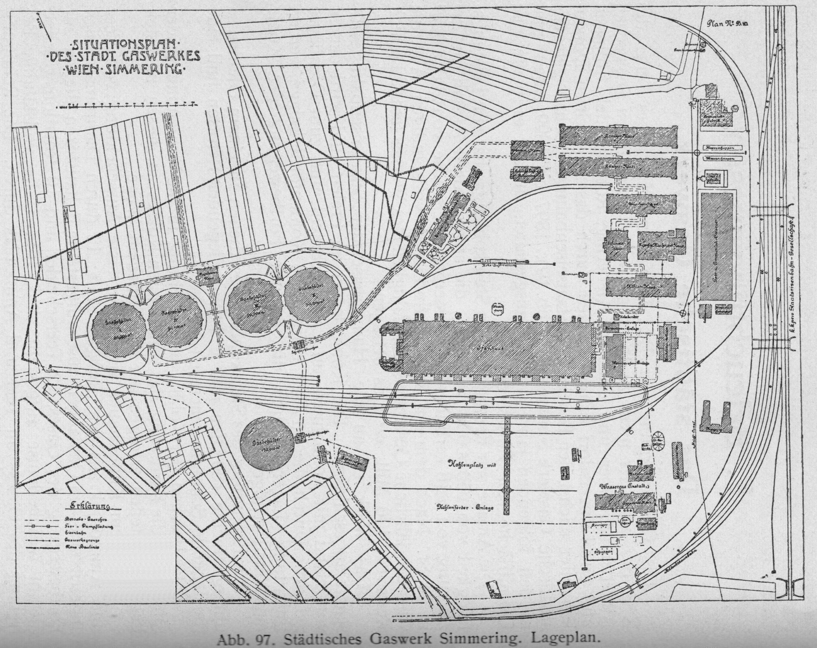 Situationsplan des Stadt Gaswerkes Wien Simmering, 1910